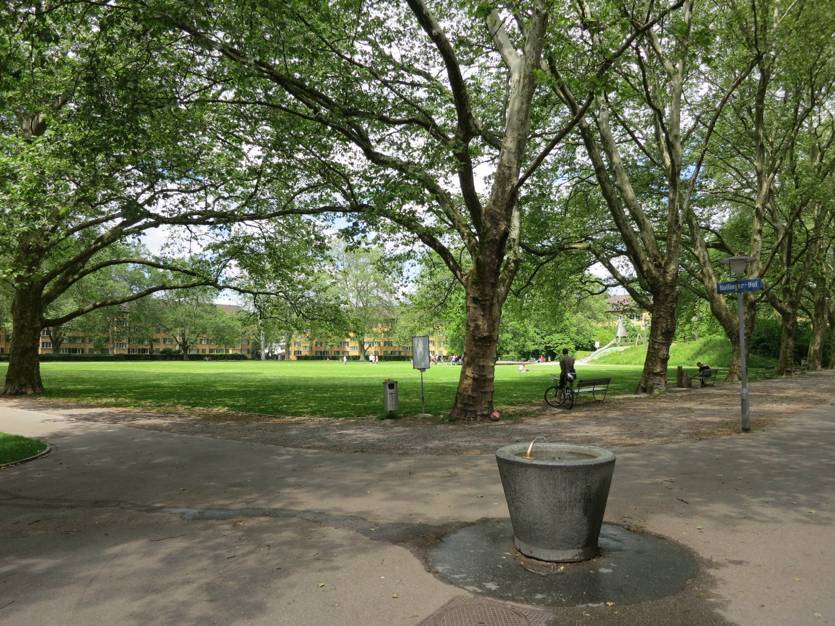 Wohnkolonie Bullingerhof, Zürich-Hard, Schweiz